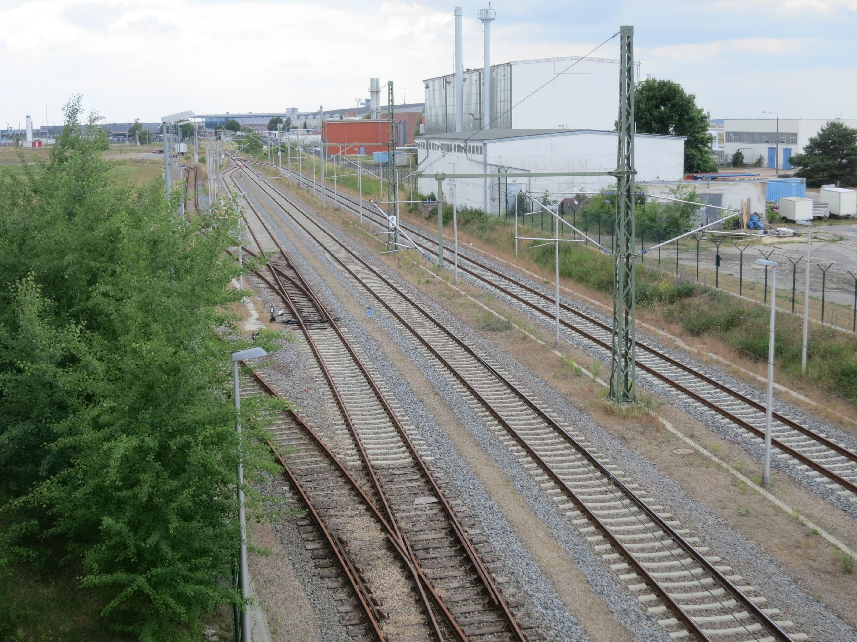 Güteramschlussbahn des Flughafens Berlin-Schönefeld/BER